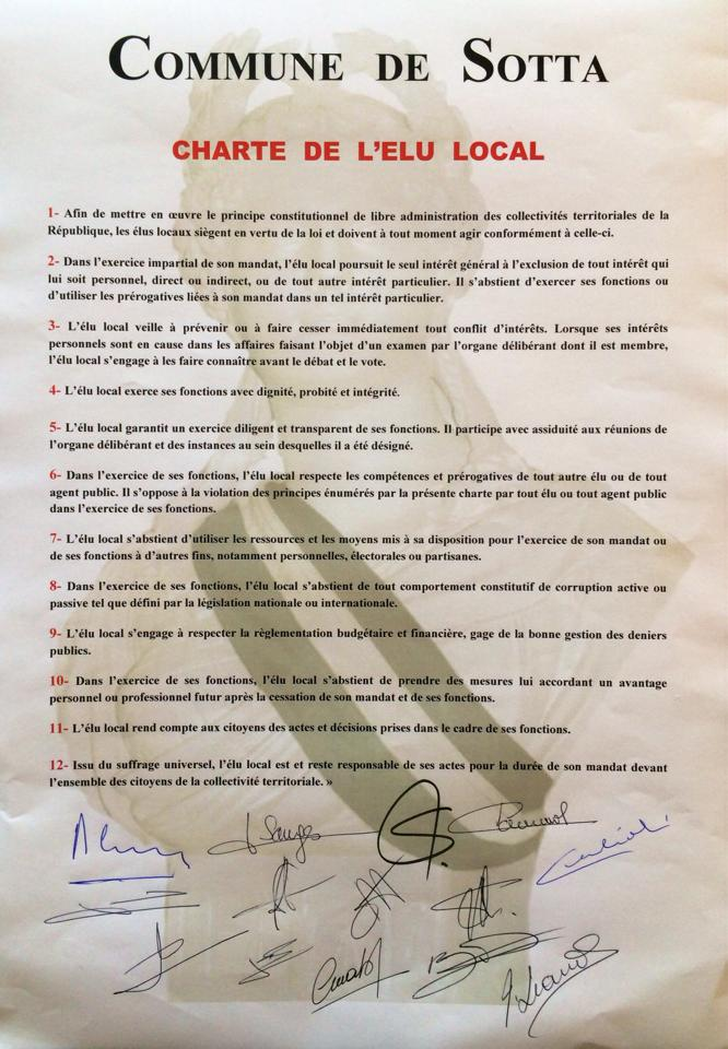 Charte de l'élu local de la Commune de SOTTA signée